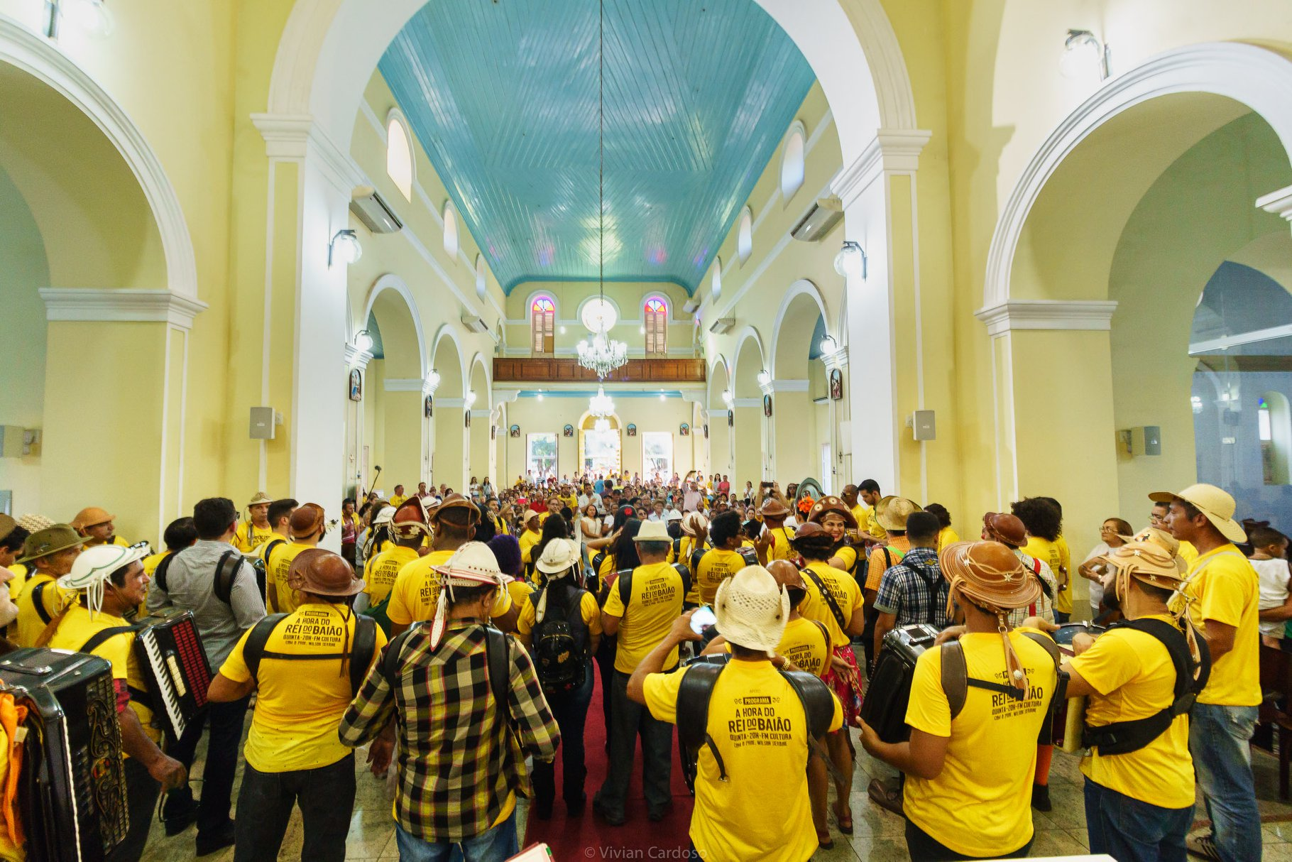 A Procissão das Sanfonas há 10 anos leva a música do Rei do Baião pelas ruas do Centro de Teresina